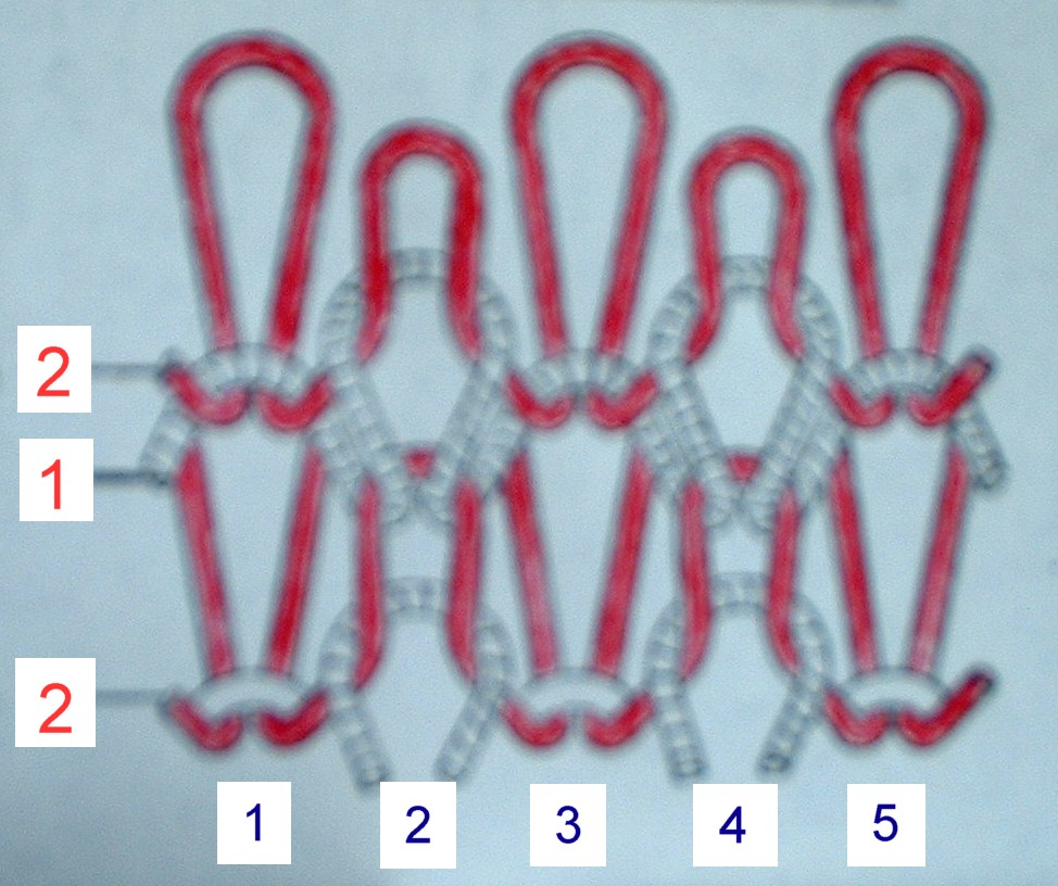 Schema der Perlfangbindung im Gestrick